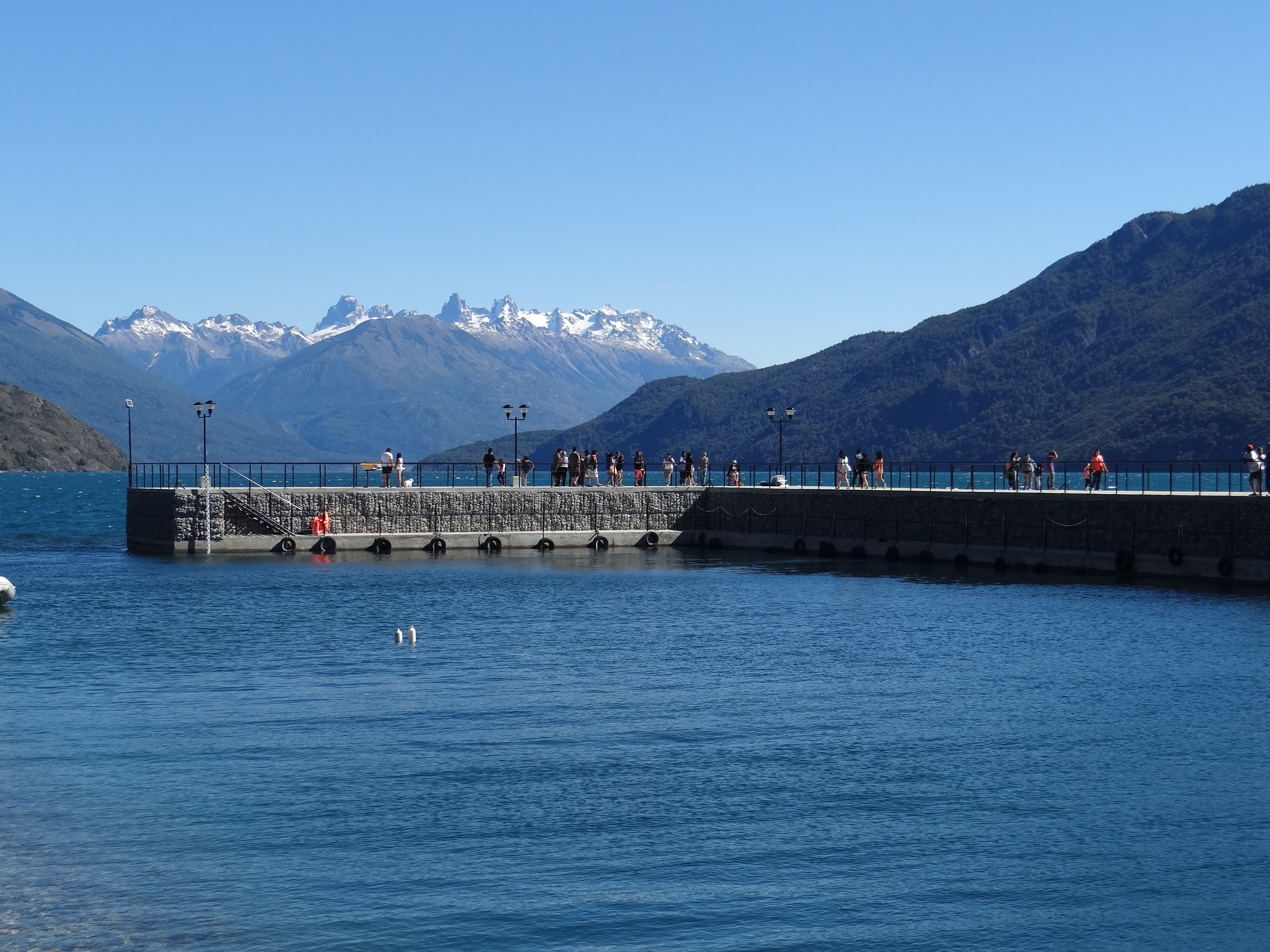 Nuevo muelle de Lago Puelo (Chubut)